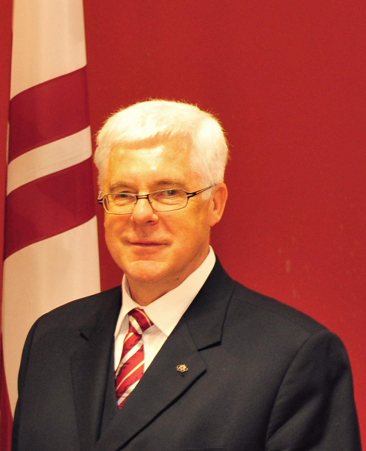 Aldons Vrubļevskis